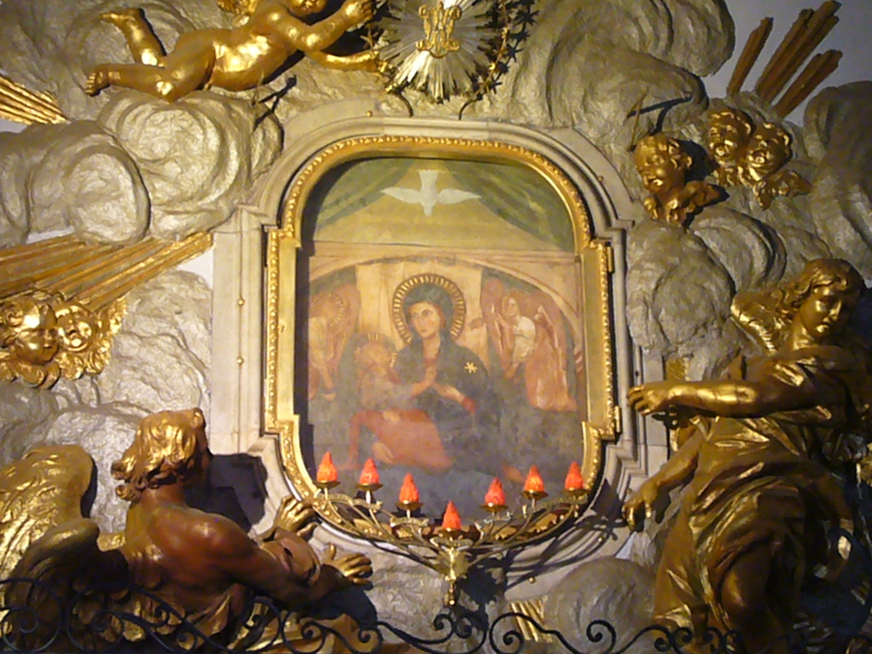 Roma, santuario del Divino Amore. Chiesa antica, l'immagine sacra